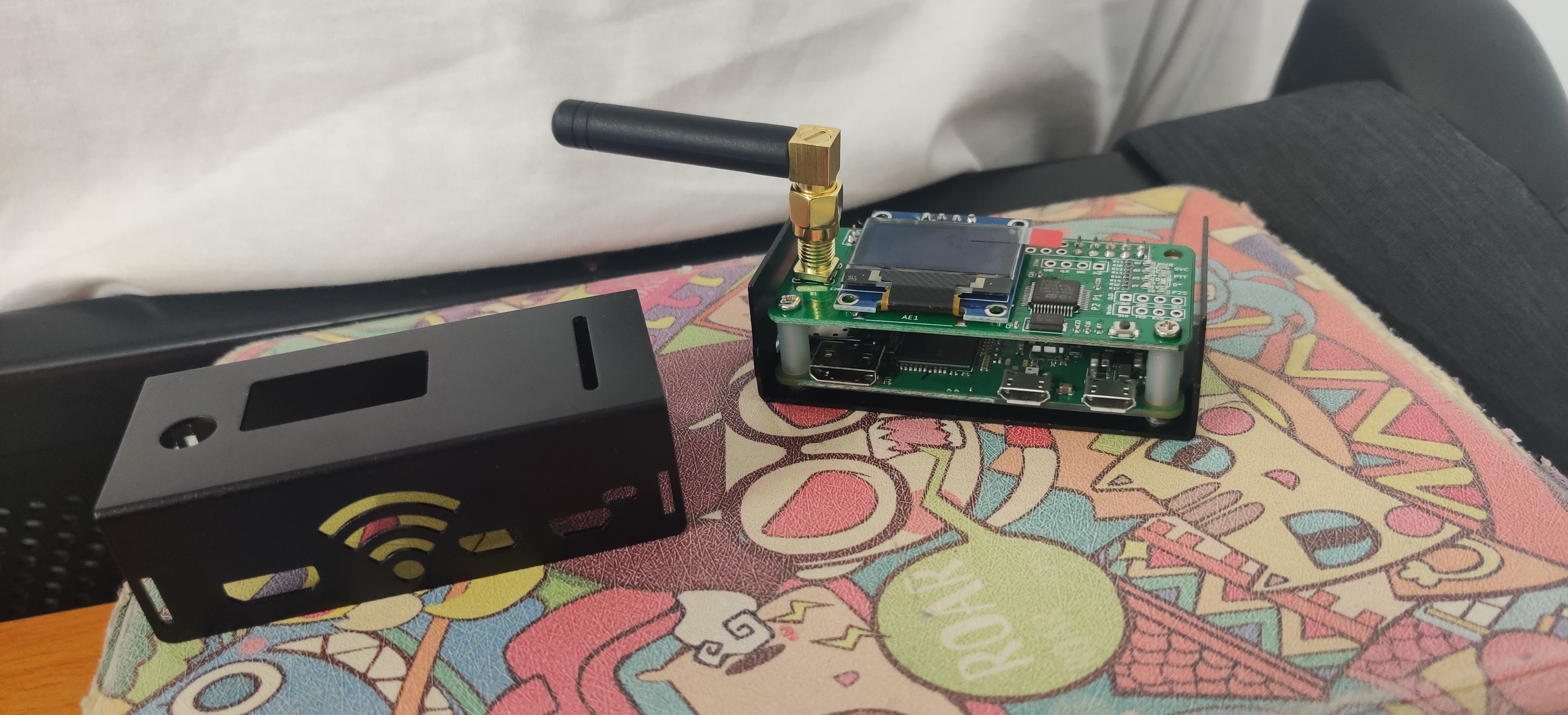 中文（中国大陆）: 一种单工mmdvm盒子的内部结构